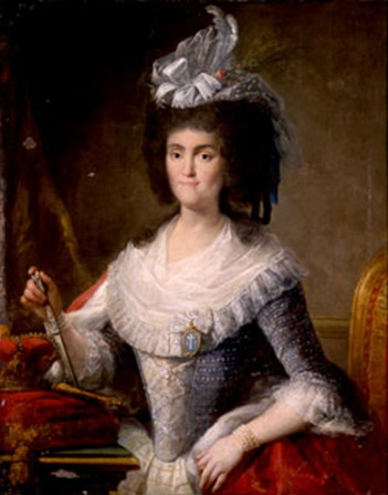 Retrato de la reina María Luisa de Parma (1751-1819), única esposa del rey Carlos IV de España y madre del rey Fernando VII.